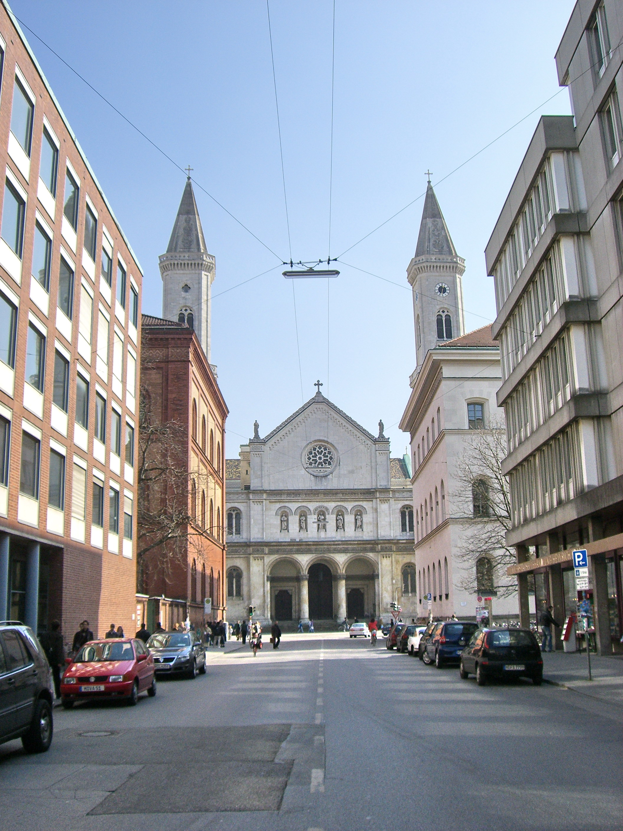 Ludwigskirche (Frontansicht aus der Schellingstraße)